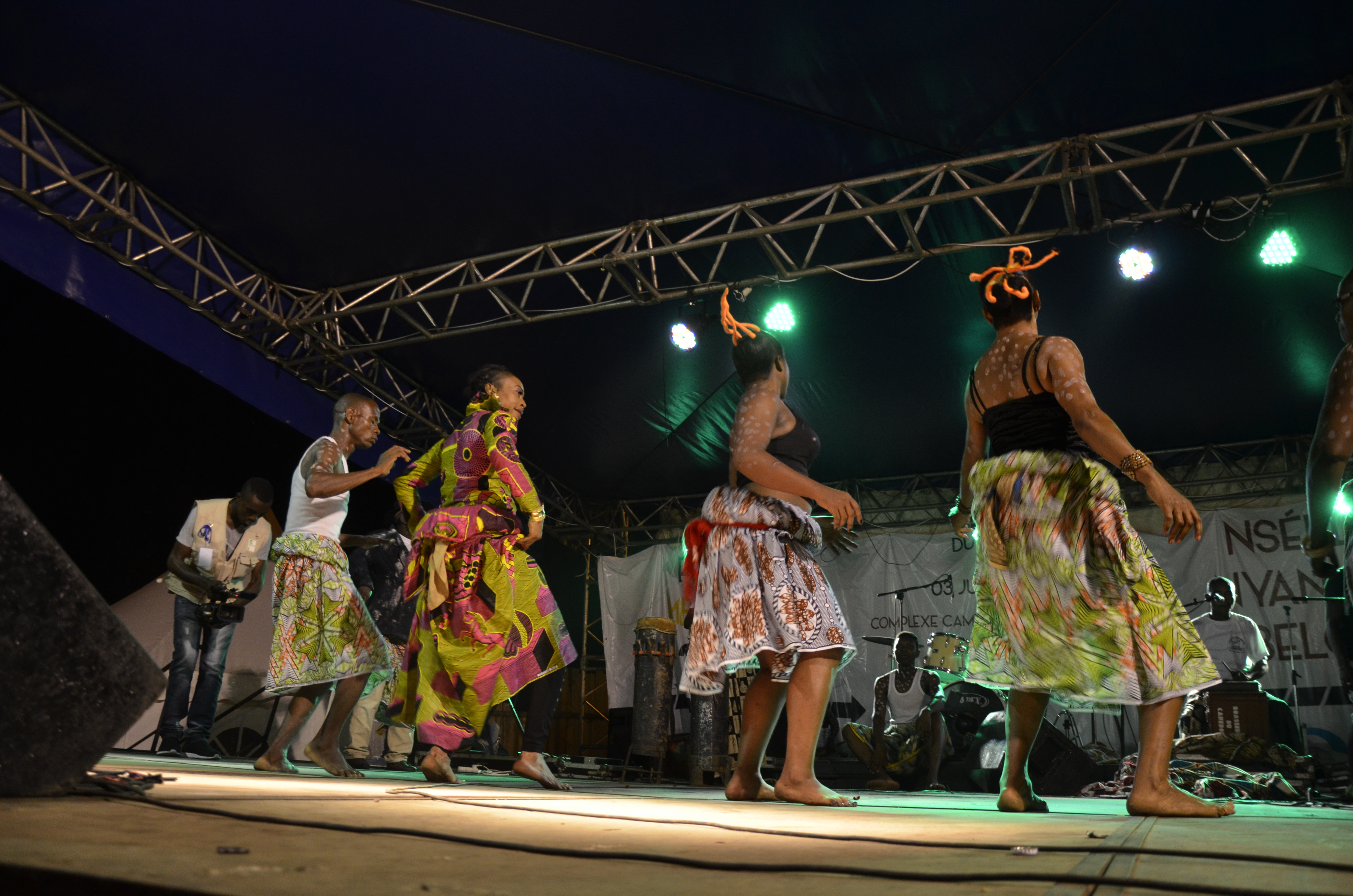 Danse traditionnelle assiko pendant le festival Mbog Liaa This is an image from Cameroon